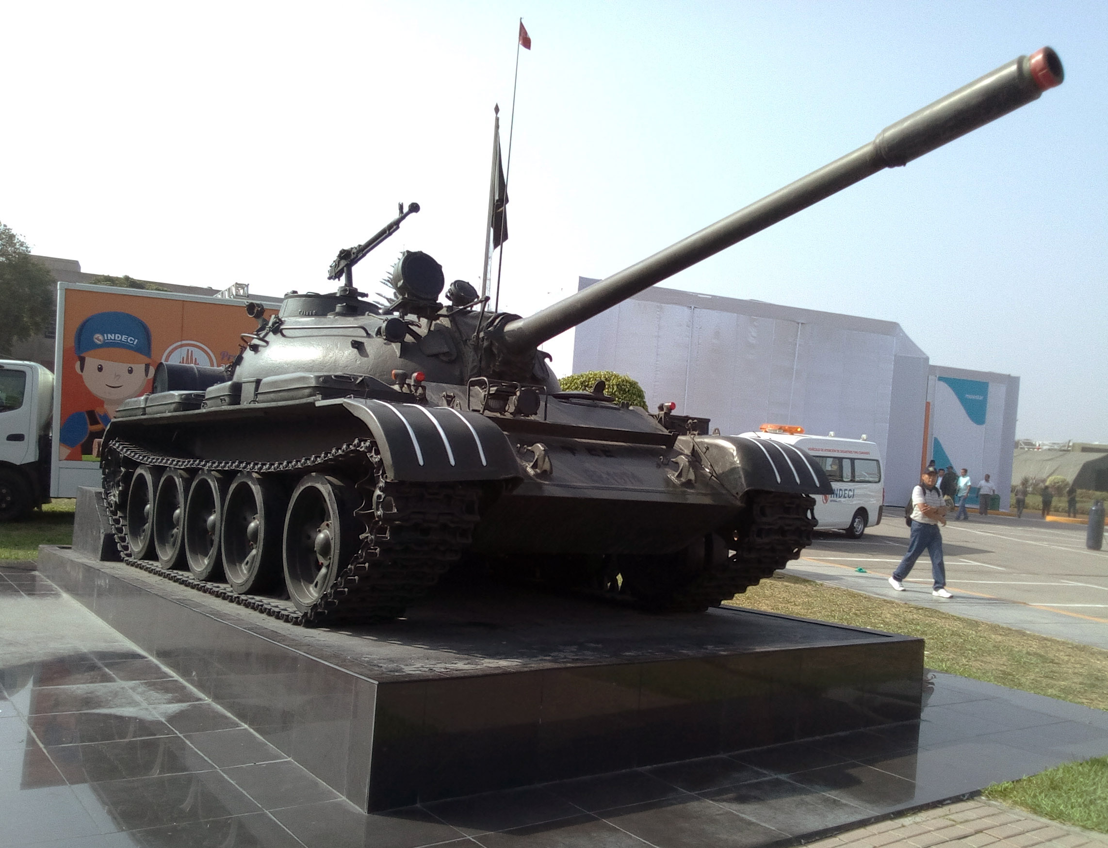 T-55 Peru 2019 en el Pentagonito